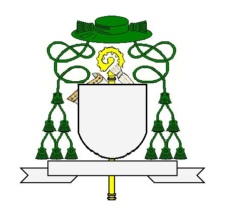 De wapens van gemijterde abten staan in de heraldiek en het kerkenrecht ter discussie maar deze tekening laat een modern abbatiaal wapen, dus zonder mijter, zien.AAn de herdersstaf hangt een zweetdoek. Eigen tekening. Robert Prummel